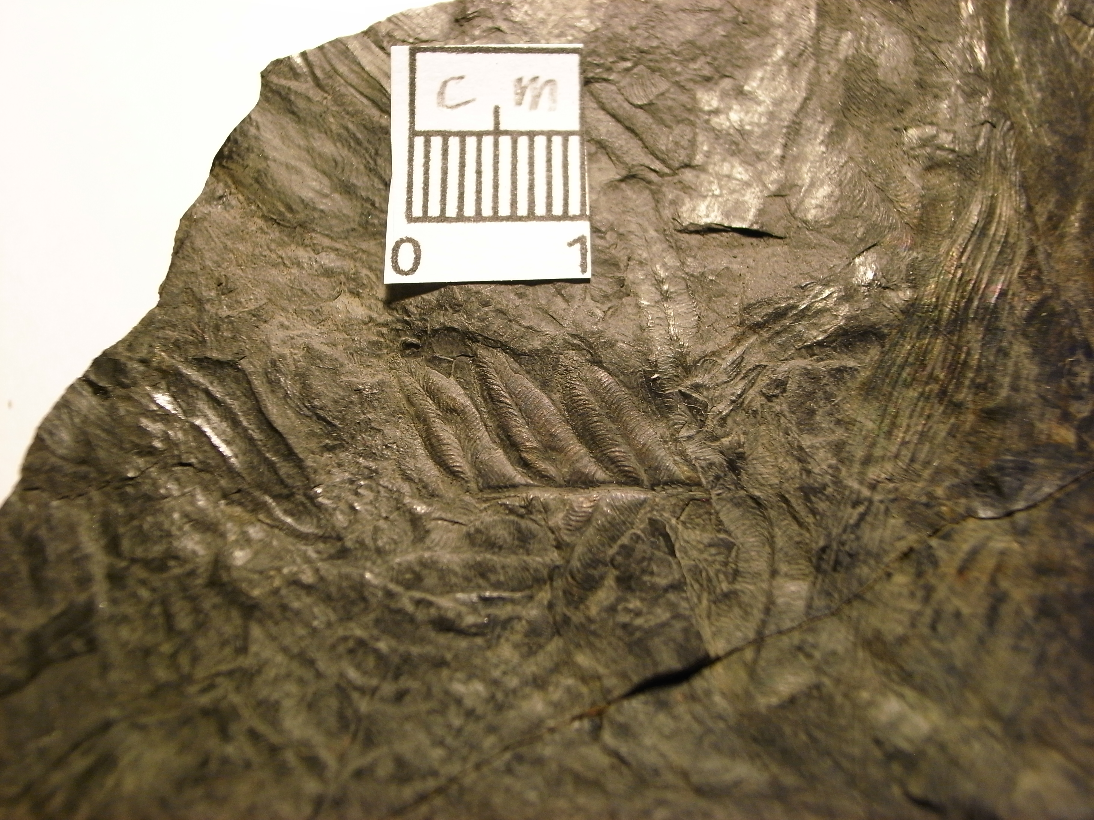 Fossilierte Pflanze in Tonschiefer, Fundort Abraum Zeche Pörtingsiepen